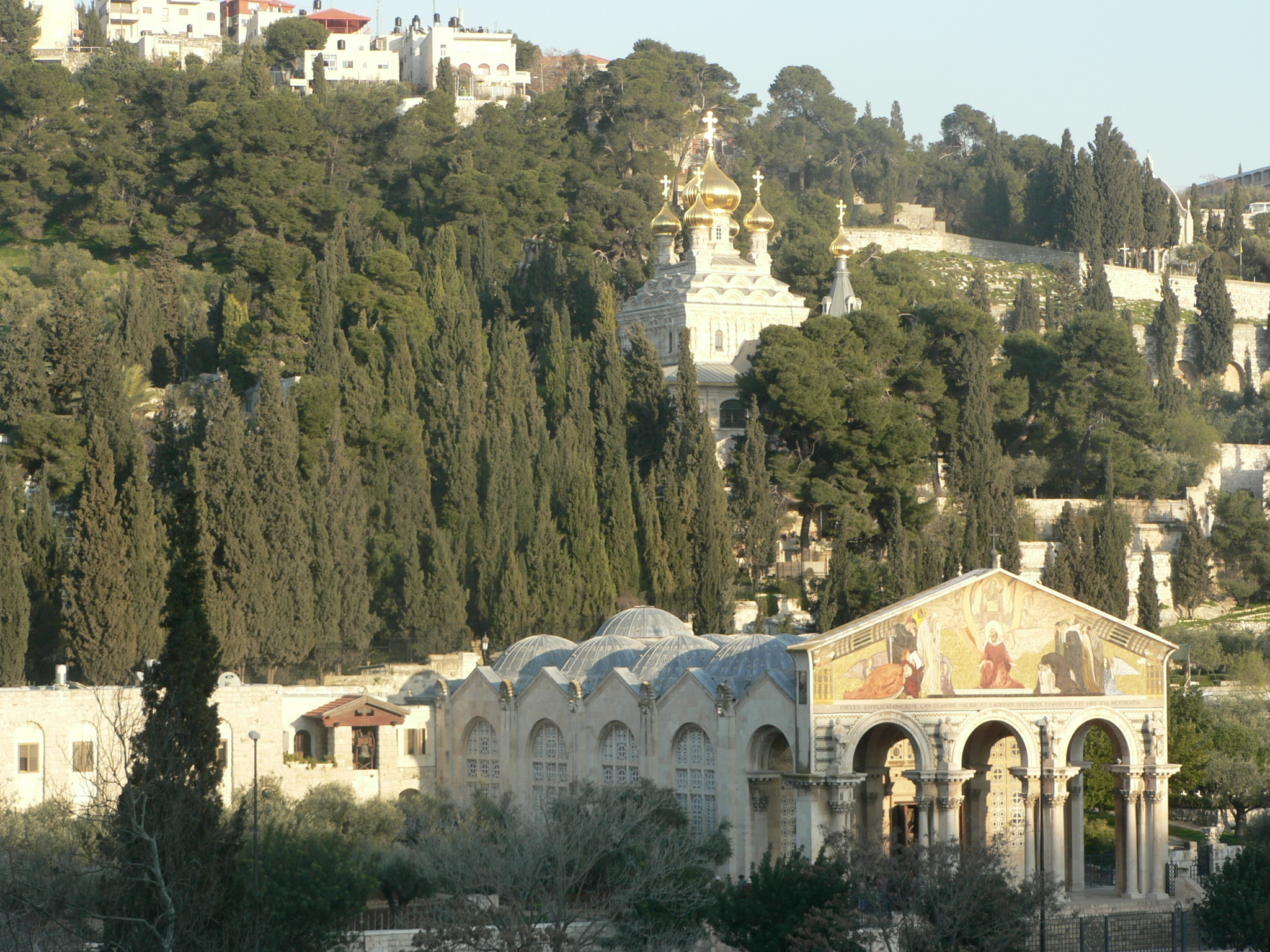 L'église de toutes les Nations